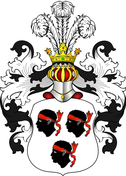 Мурисон − польський шляхетський герб шотландського походження.